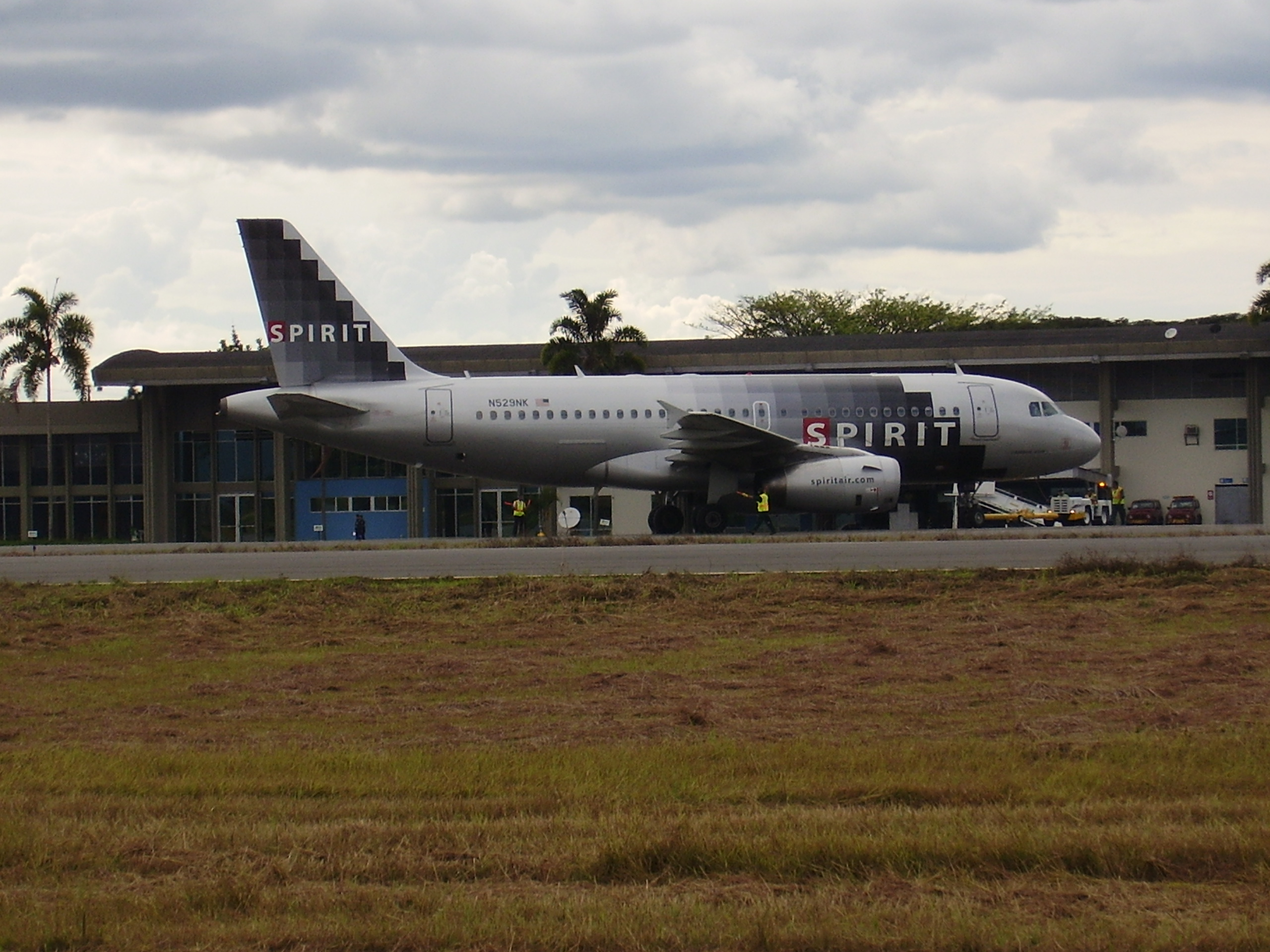 Airbus 319-100 de Spirit Airlines Próximo a Despegar Hacia Fort Lauderdale Desde Armenia